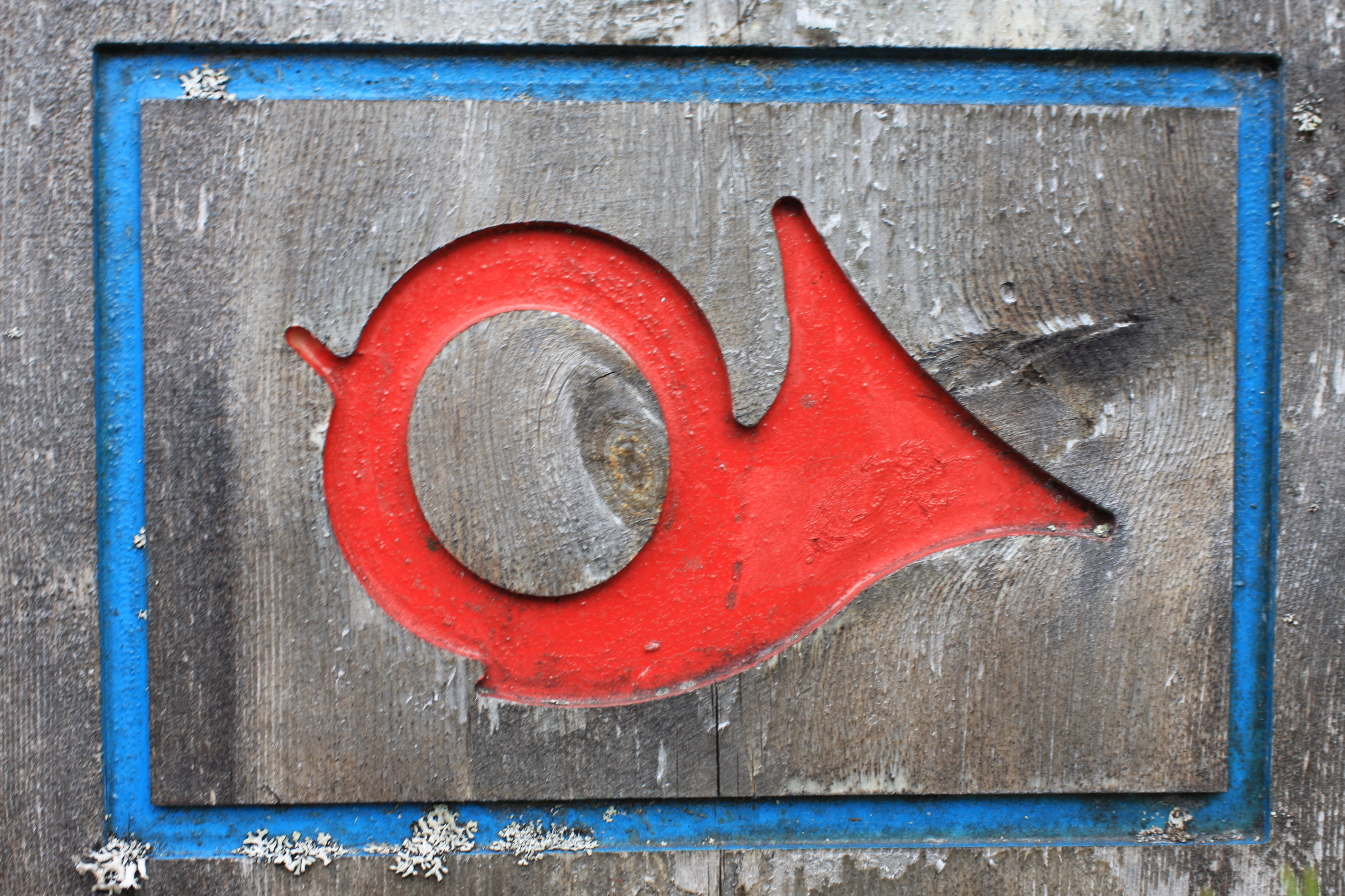 Postvei-logo